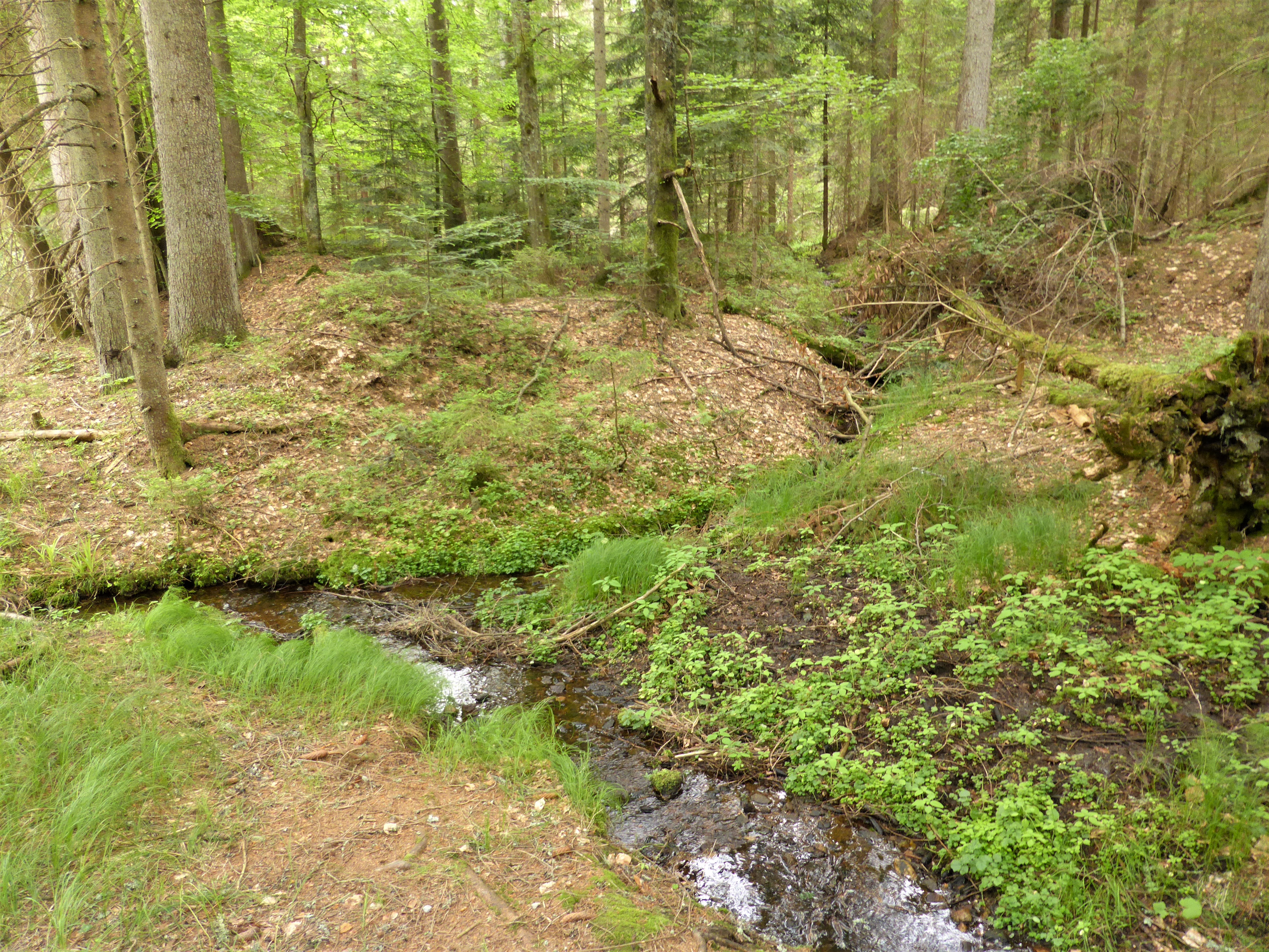 Im Bayerischen Wald finden sich an mehreren Bächen und Gräben Spuren des ehemaligen Goldabbaus. Ganz in der Nähe des Schwellhäusl beim Zwieseler Waldhaus befindet sich ein Bodendenkmal dieser Art. Es ist Geotop im Landkreis Regen mit der Nummer: 276G014.